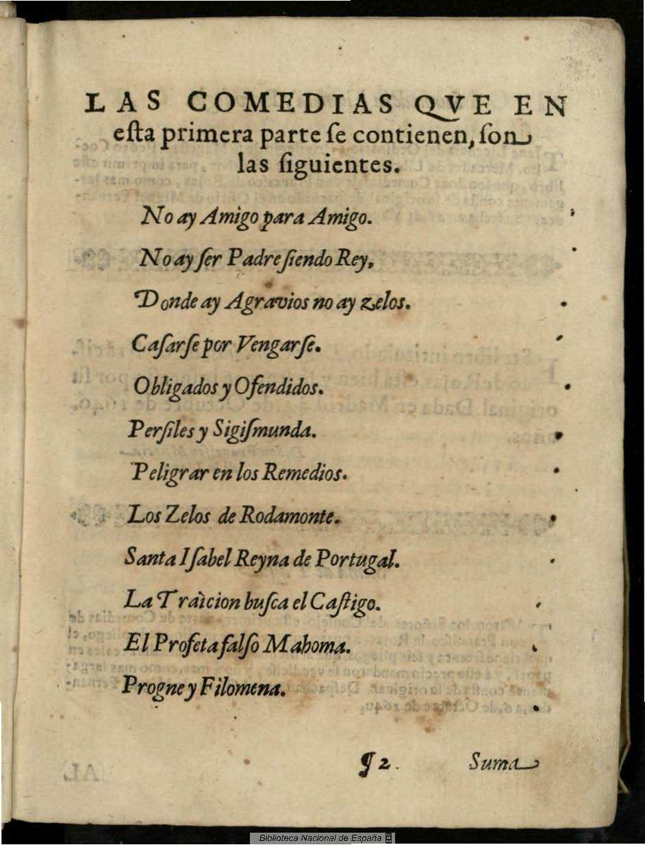 Primera parte de las comedias de Don Francisco de Rojas Zorrilla ... Autor: Rojas Zorrilla, Francisco de (1607-1648) Fecha: 1640 Datos de edición: En Madrid por María de Quiñones a costa de Pedro Coello ... Contenido: No ay amigo para amigo, h. 1-22v ; No ay ser padre siendo Rey, h. 23-47 ; Donde ay agravios no ay zelos, h. 47v-71 ; Casarse por vengarse, h. 71v-94v ; Obligados y ofendidos, h. 99-124v ; Persiles y Sigismunda, h. 125-148v ; Peligrar en los remedios, h. 149-173v ; Los zelos de Rodamonte, h. 174-199v ; Santa Isabel, Reina de Portugal, h. 200-222 ; La traición busca el castigo, h. 222v-248 ; El profeta falso Mahoma, h. 248v-273v ; Progne y Filomena, 274-300vNo ay amigo para amigo, h. 1-22v ; No ay ser padre siendo Rey, h. 23-47 ; Donde ay agravios no ay zelos, h. 47v-71 ; Casarse por vengarse, h. 71v-94v ; Obligados y ofendidos, h. 99-124v ; Persiles y Sigismunda, h. 125-148v ; Peligrar en los remedios, h. 149-173v ; Los zelos de Rodamonte, h. 174-199v ; Santa Isabel, Reina de Portugal, h. 200-222 ; La traición busca el castigo, h. 222v-248 ; El profeta falso Mahoma, h. 248v-273v ; Progne y Filomena, 274-300v